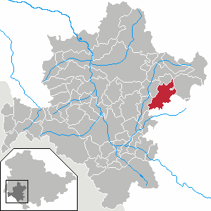 Benshausen in Thuringia - District Schmalkalden-Meiningen